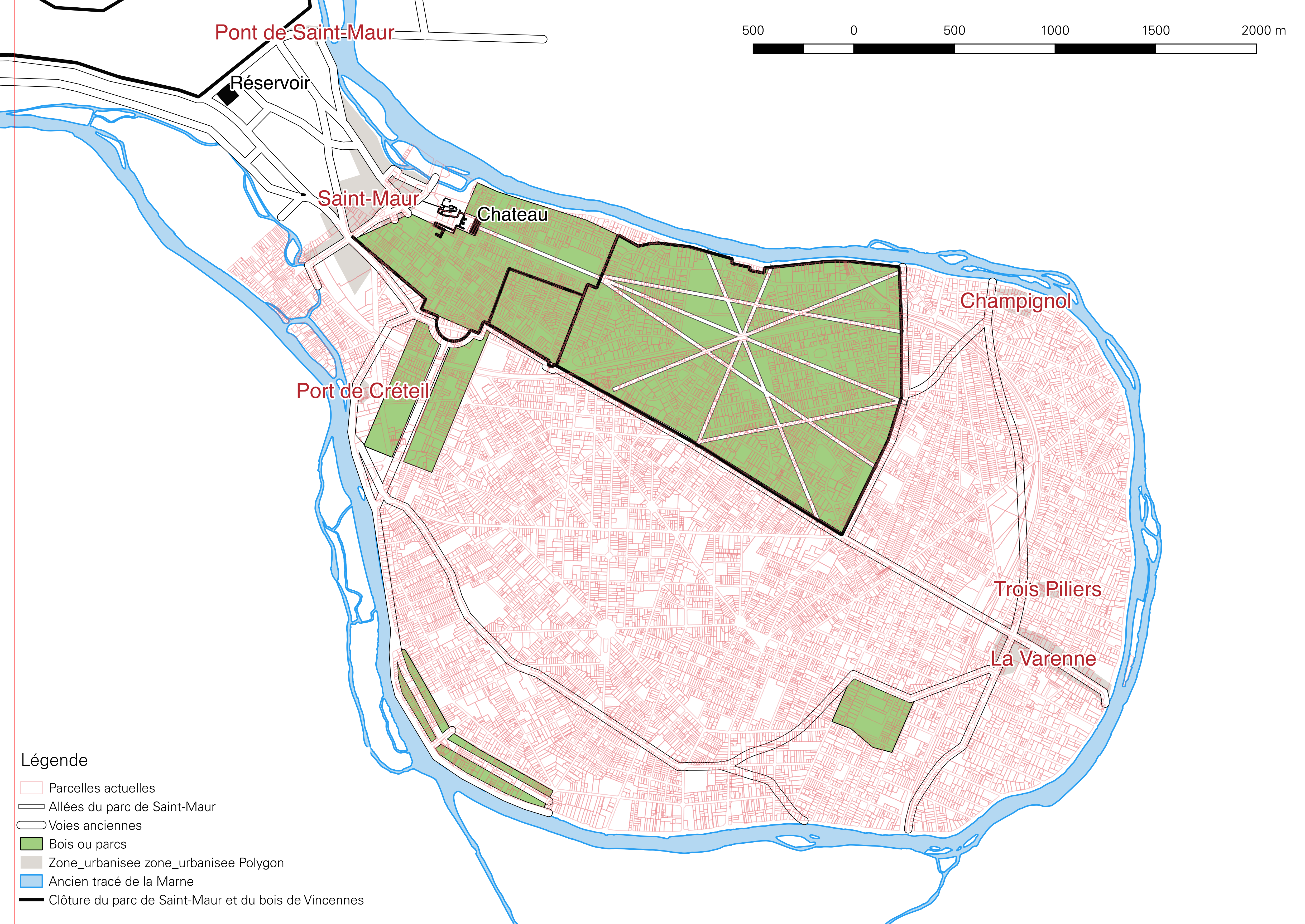 Plan de la péninsule de Saint-Maur-des-Fossés au cours de la première moitié du 18e siècle. Basée sur le géoréférencement de diverses cartes anciennes et documents cadastraux.